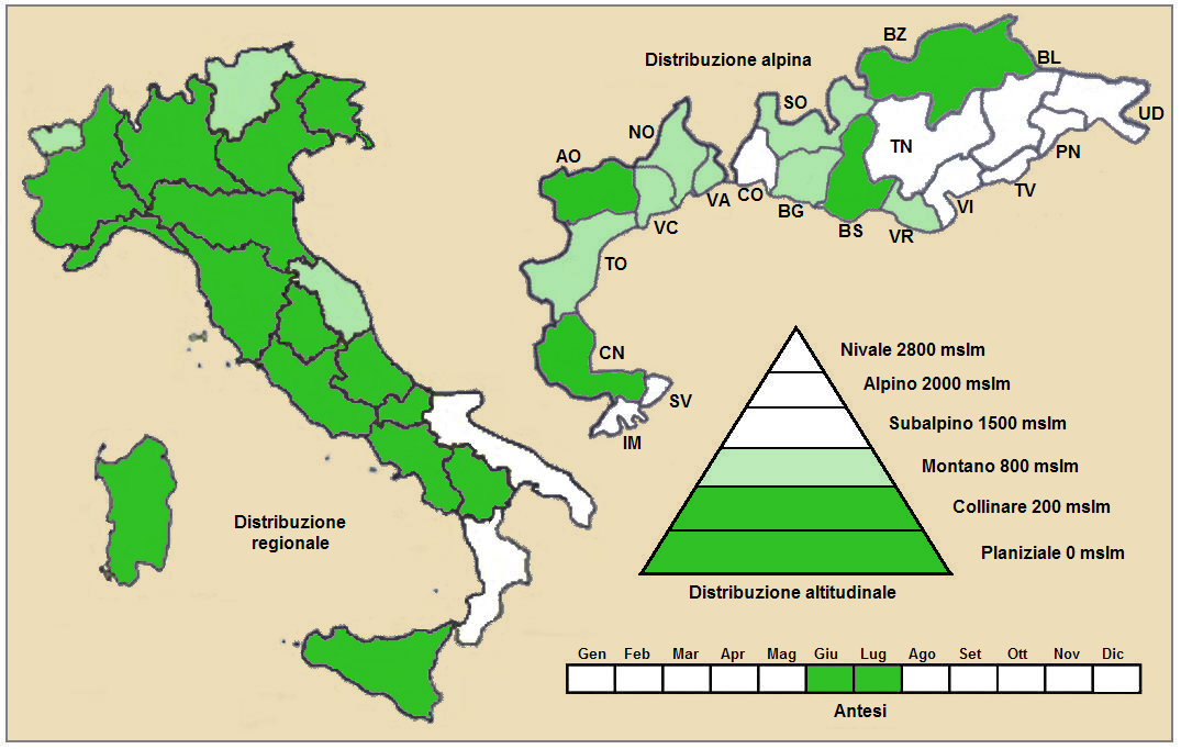 Salvia sclarea - Distribuzione